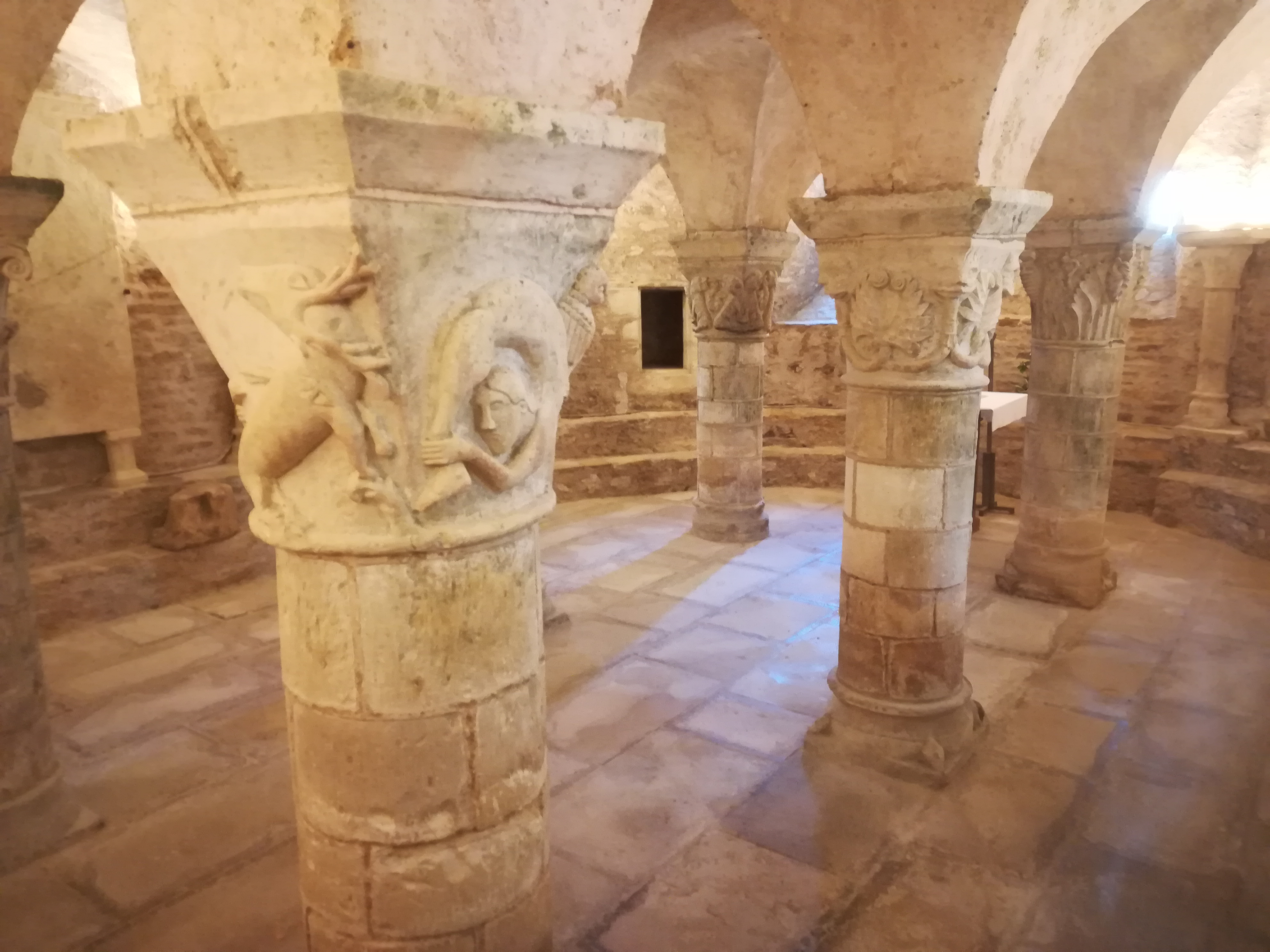 Photographie de la crypte de l'église Saint-Patrice de Saint-Parize-le-Châtel, où l'on peut voir quatre des six colonnes, dont les chapiteaux présentent des bas-reliefs aux motifs variés : un acrobate, un cerf chassé, une chouette, des lions, des végétaux aux formes géométriques...